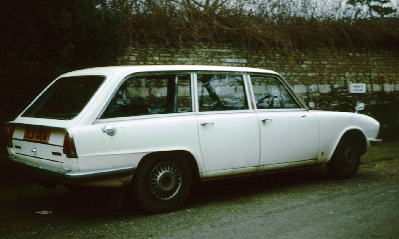 1974 Triumph 2000 Mk II Estate